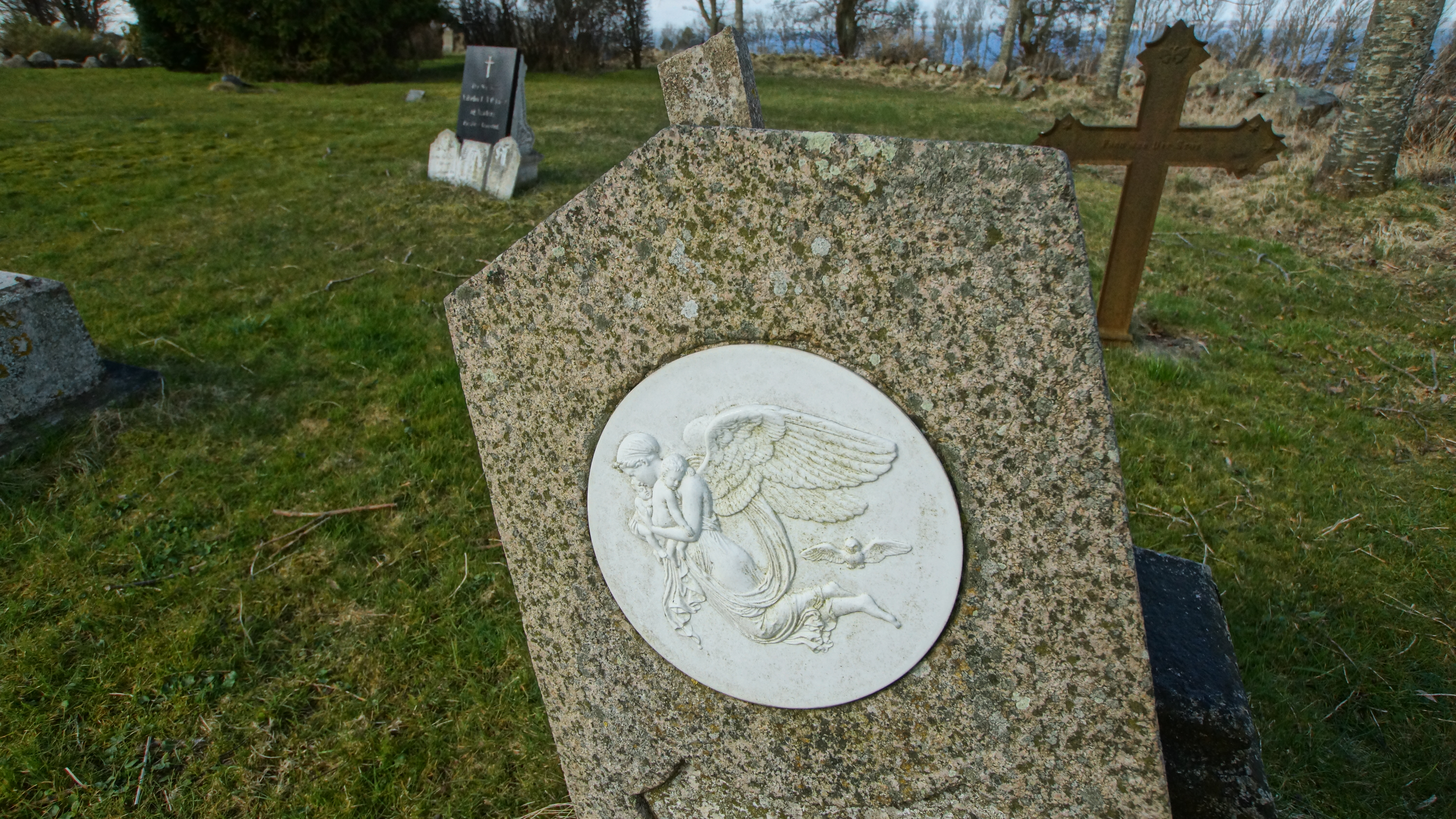 Rolsø Kapel, Gravsten 8